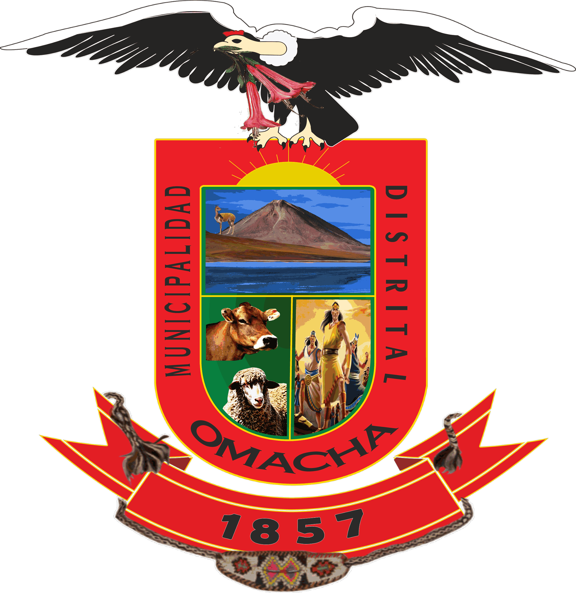 Escudo de la Municipalidad Distrital de Omacha